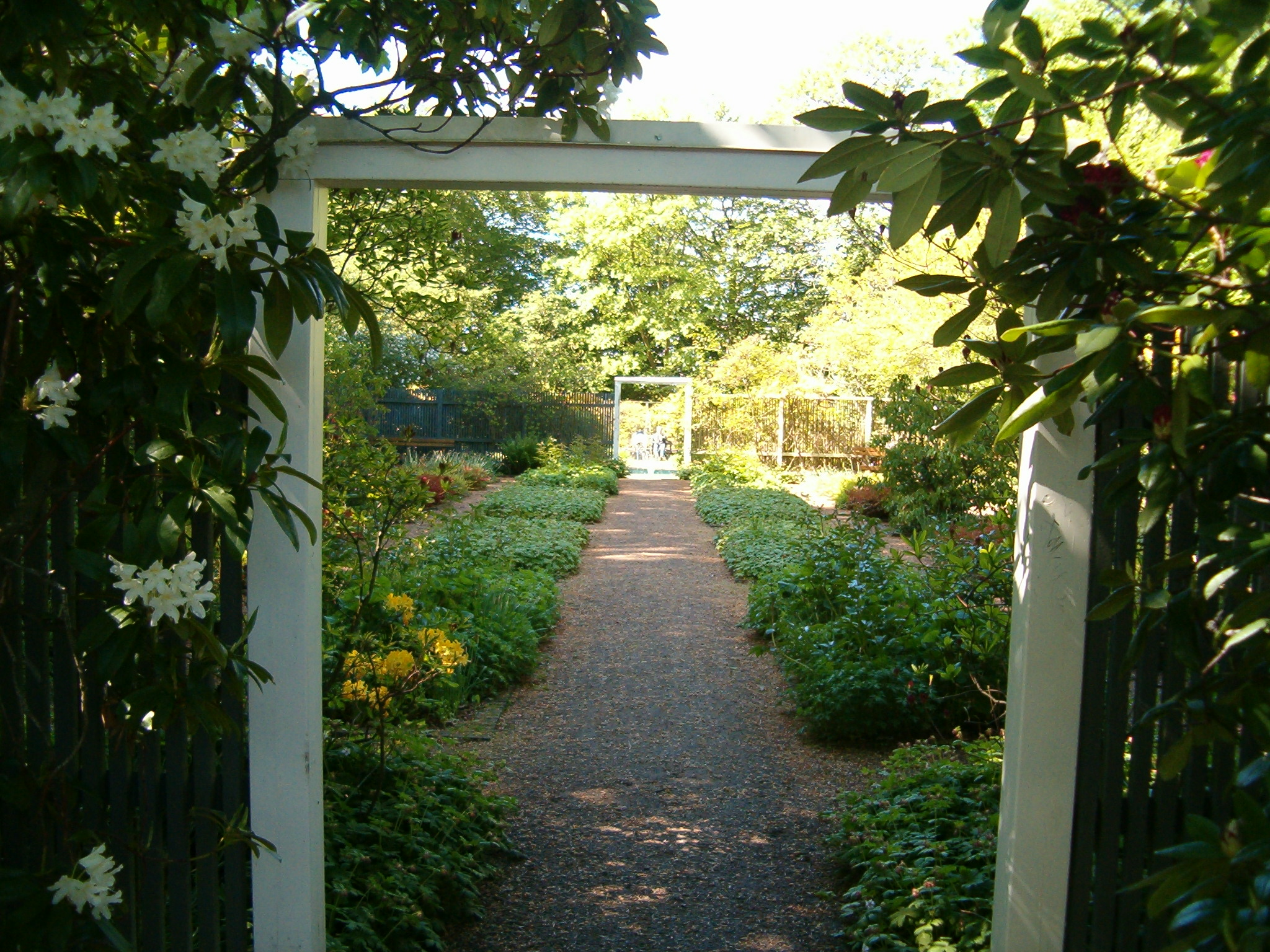 Garden at Vikingsberg Helsingborg, Sweden.